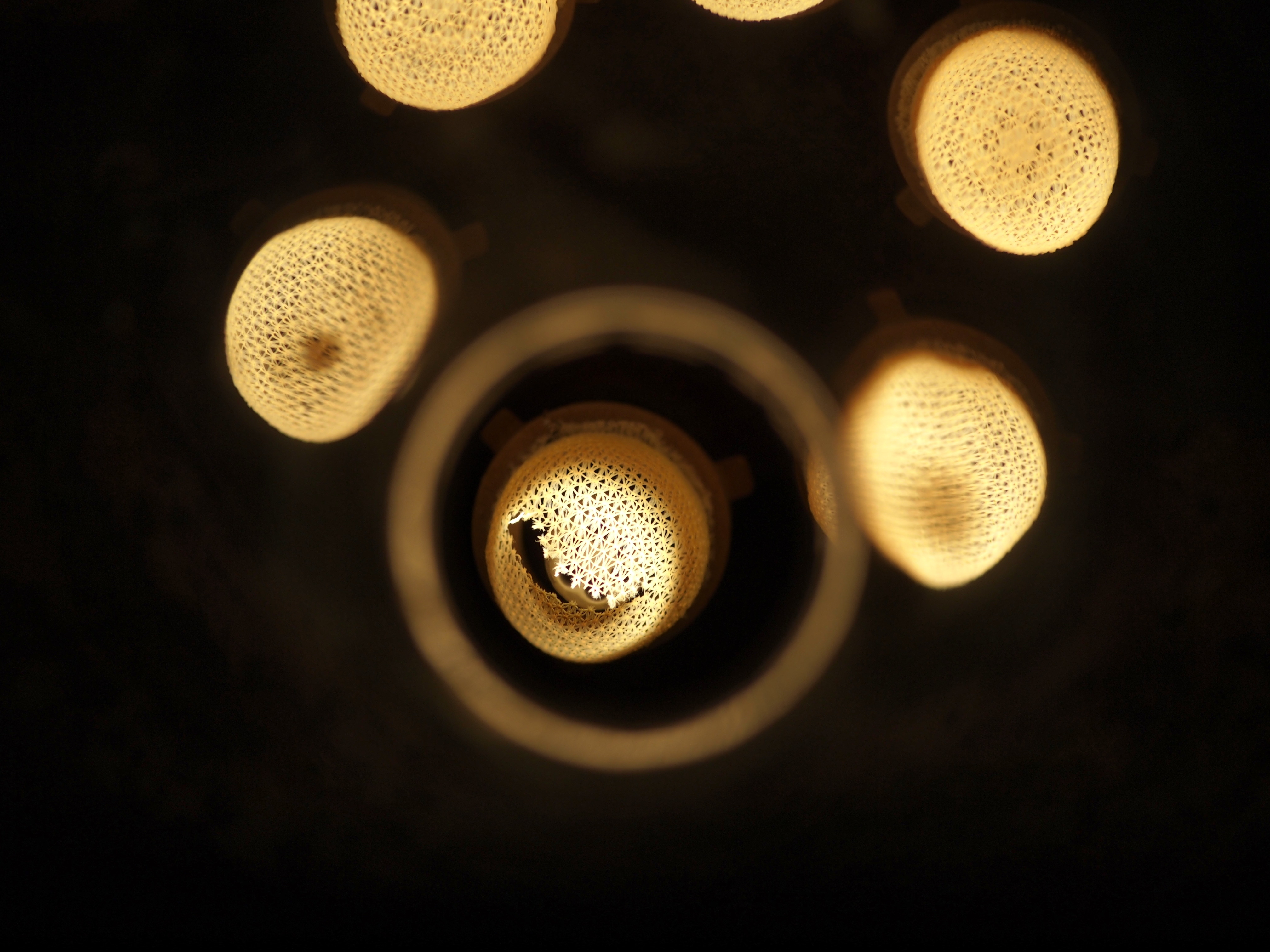 Heißer Glühstrumpf in einer Gaslaterne in Lübeck